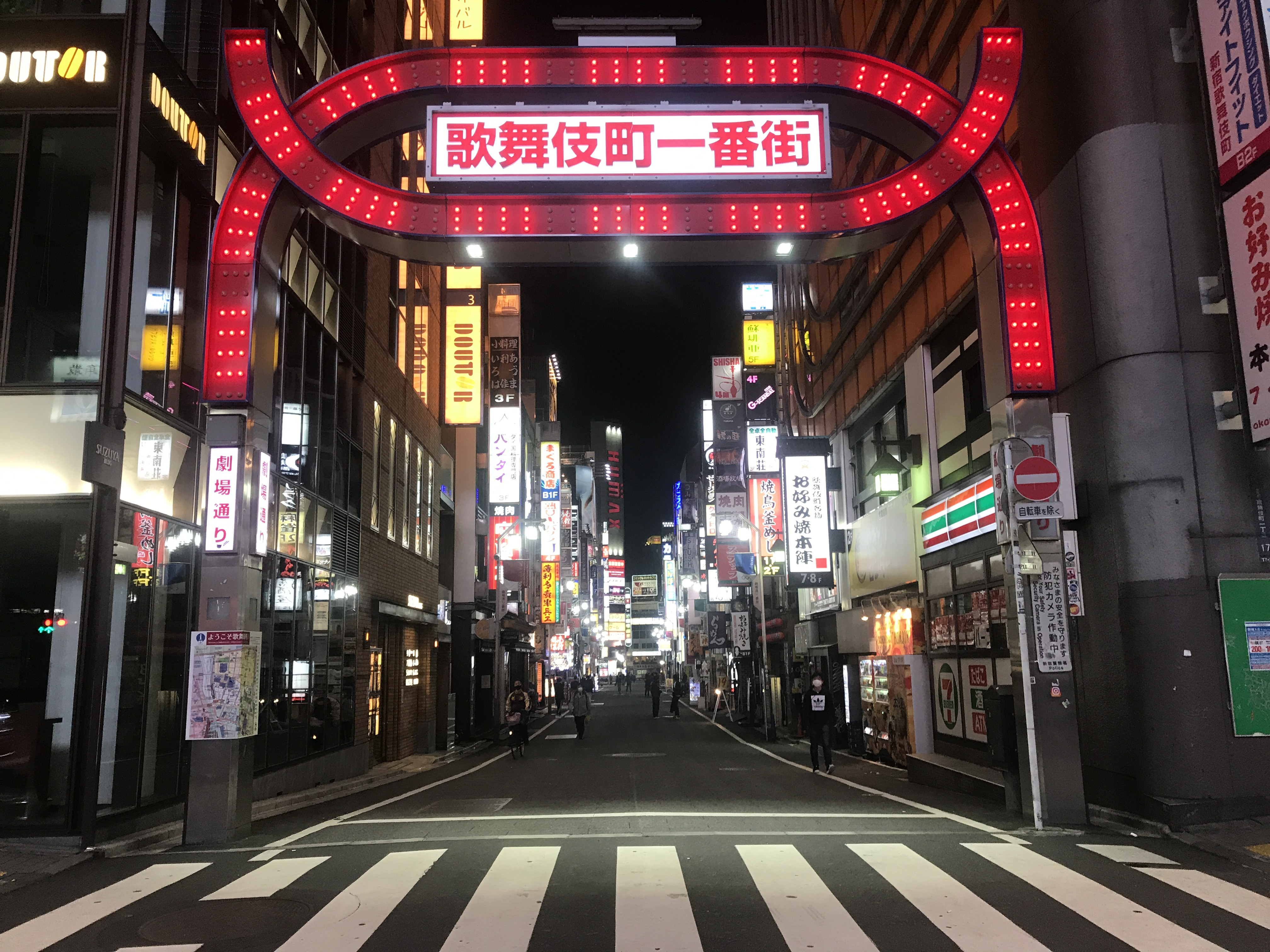 緊急事態宣言下の夜の新宿の歌舞伎町一番街の人の通りの様子。華の金曜日にもかかわらず、通行はまばらである。